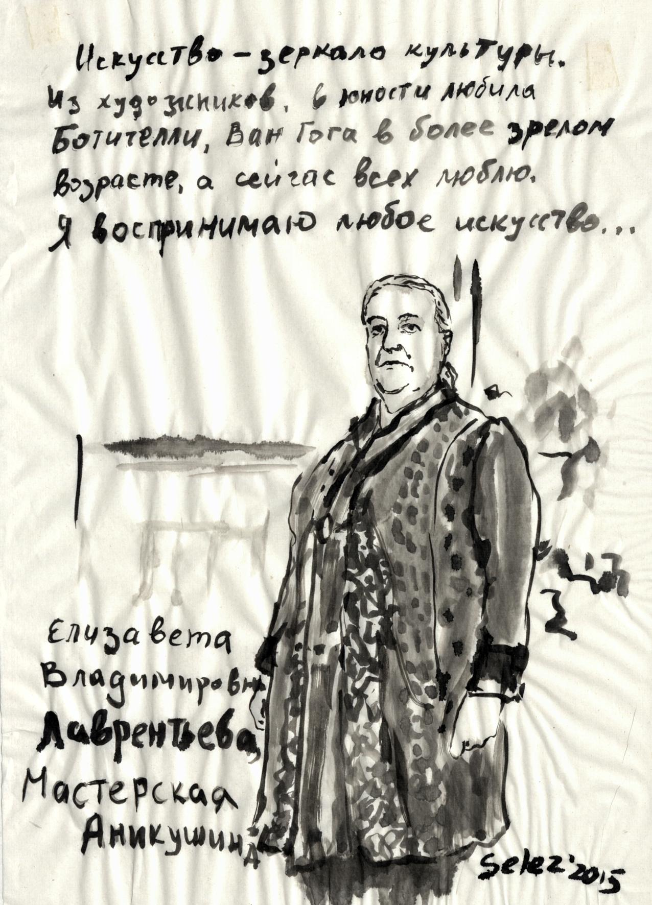 Несколько прекрасных вещей, о которых мы узнали благодаря музейным смотрителям (2015)